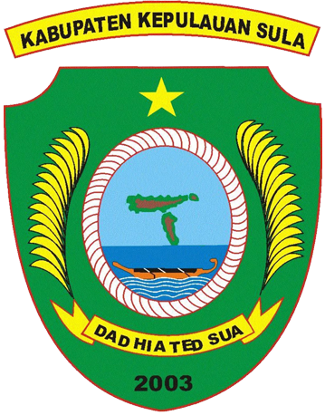 Lambang Kabupaten Kepulauan Sula